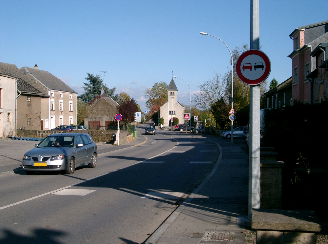 Éilereng, Monnerecherstrooss. Kategorie:Gemeng Suessem